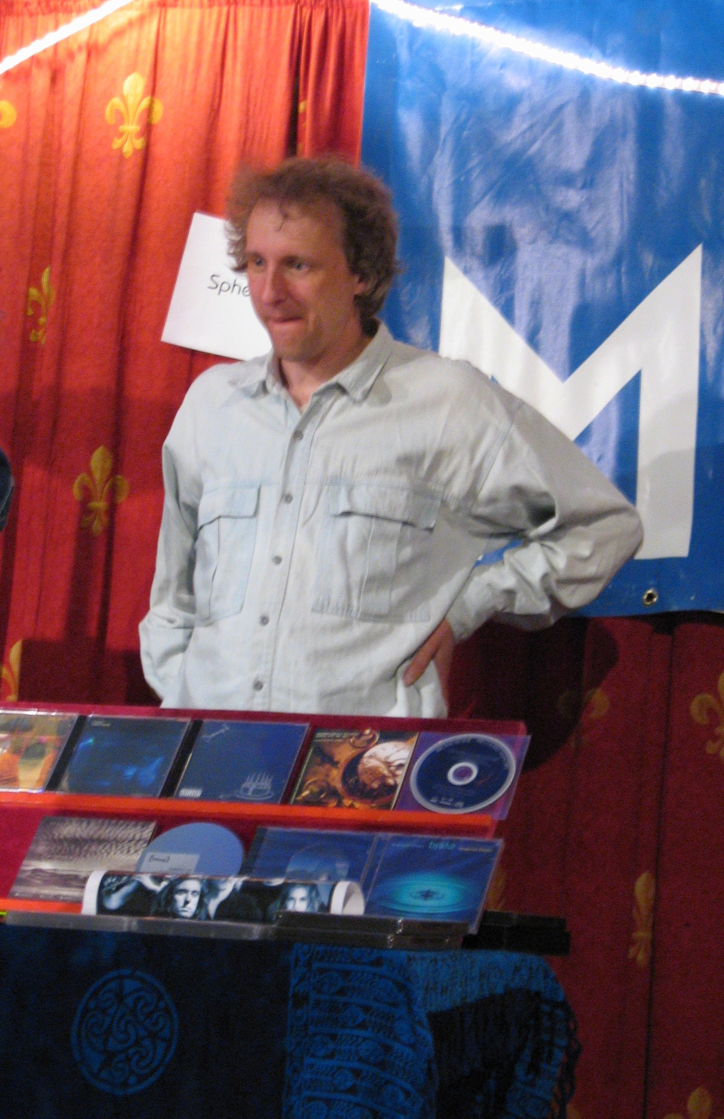 Lambert Ringlage, Satzvey Festival, April 2007